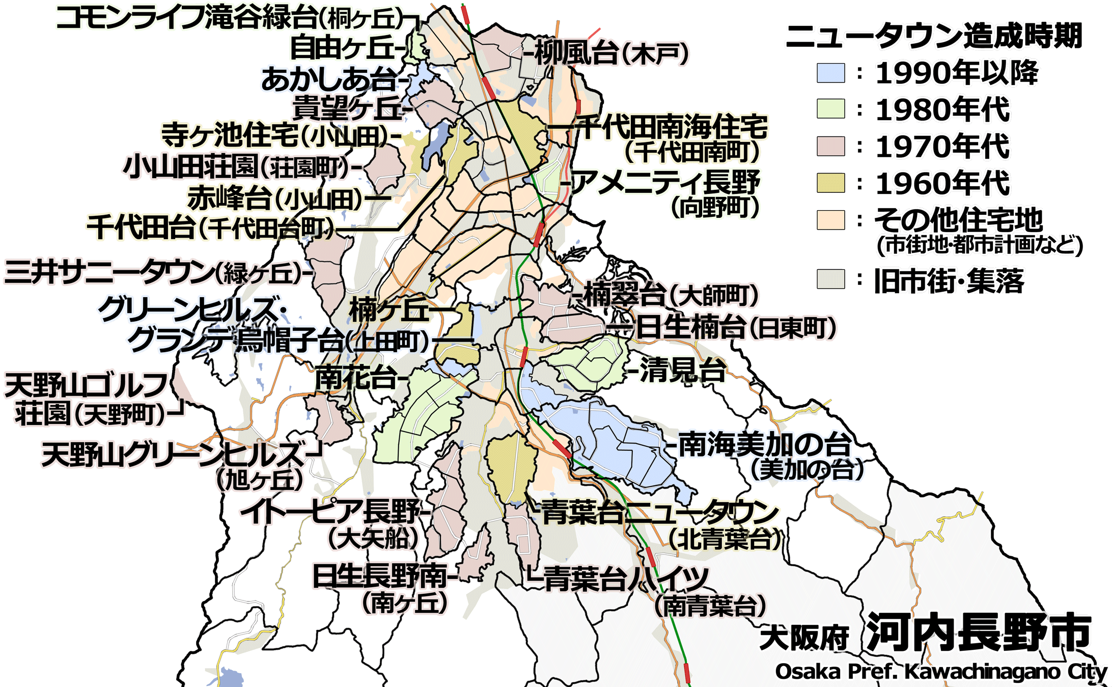 大阪府河内長野市のニュータウンの造成期別の色分け地図